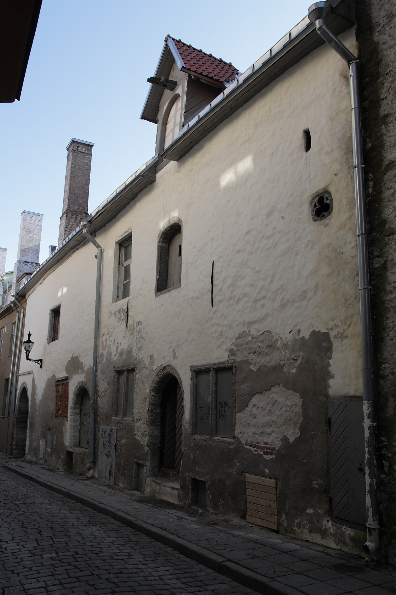 Tallinn, ait Sauna 10, 15.-20. saj